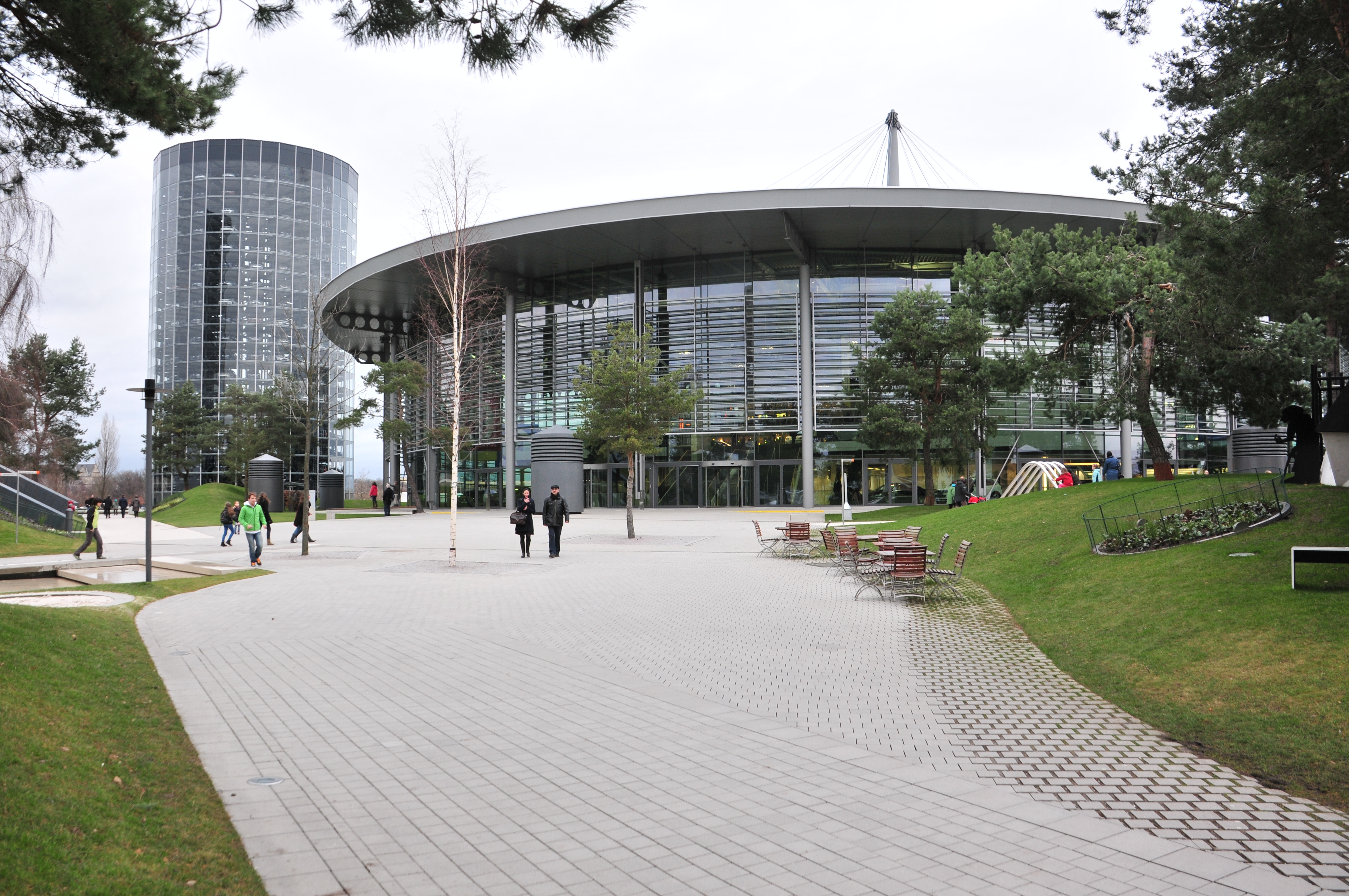 Autostadt Wolfsburg